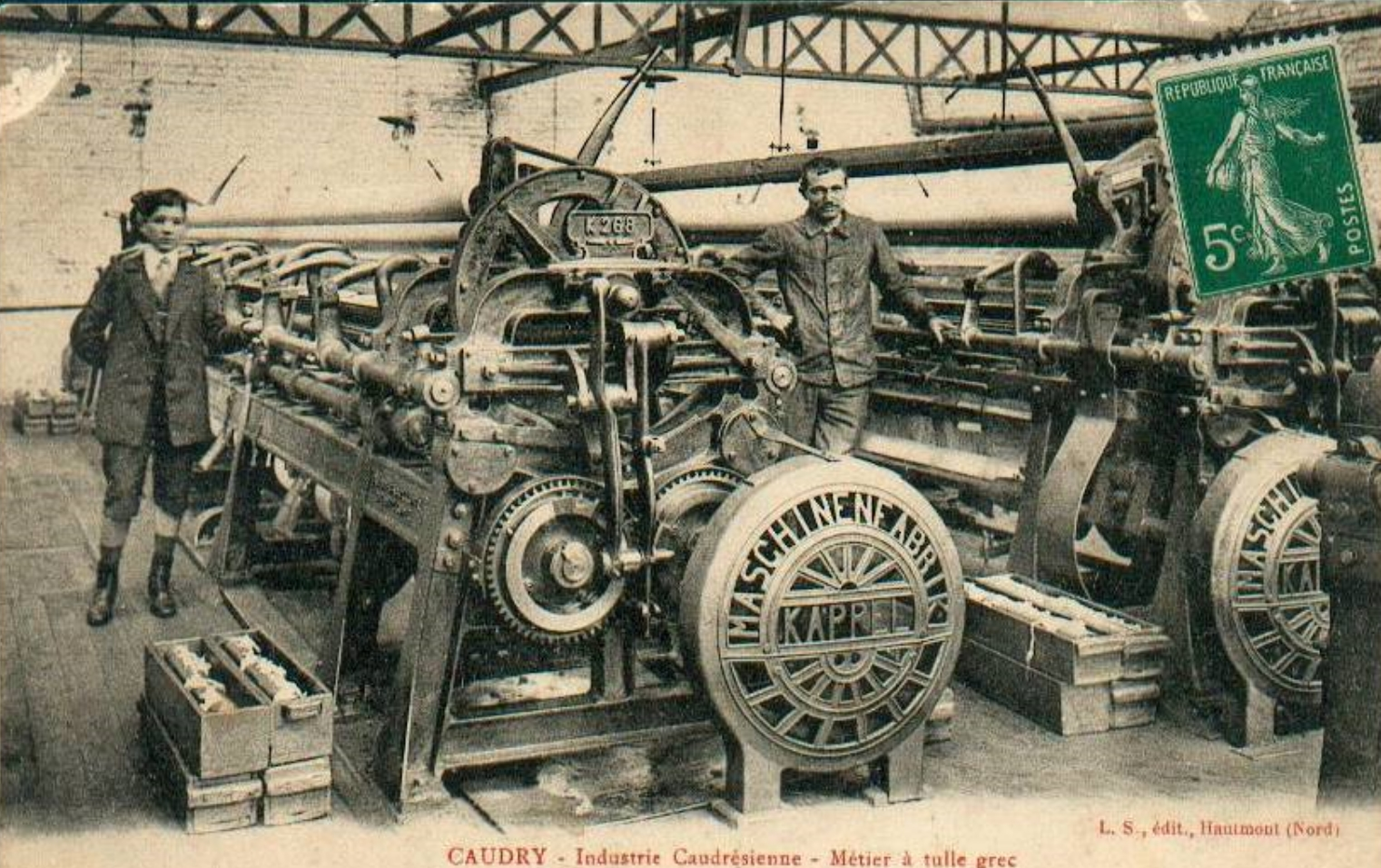 Métier à tulle grec de la Maschinenfabrik Kappel (Chemnitz) à Caudry, Nord, Nord-Pas-de-Calais (Hauts-de-France depuis 2016), France.